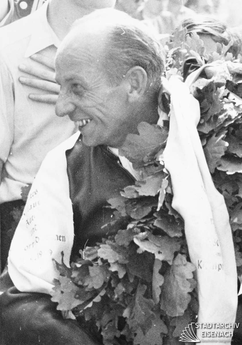 Der Sieger der 250-cm³-Klasse mit Kompressor Walfried Winkler, Chemnitz.